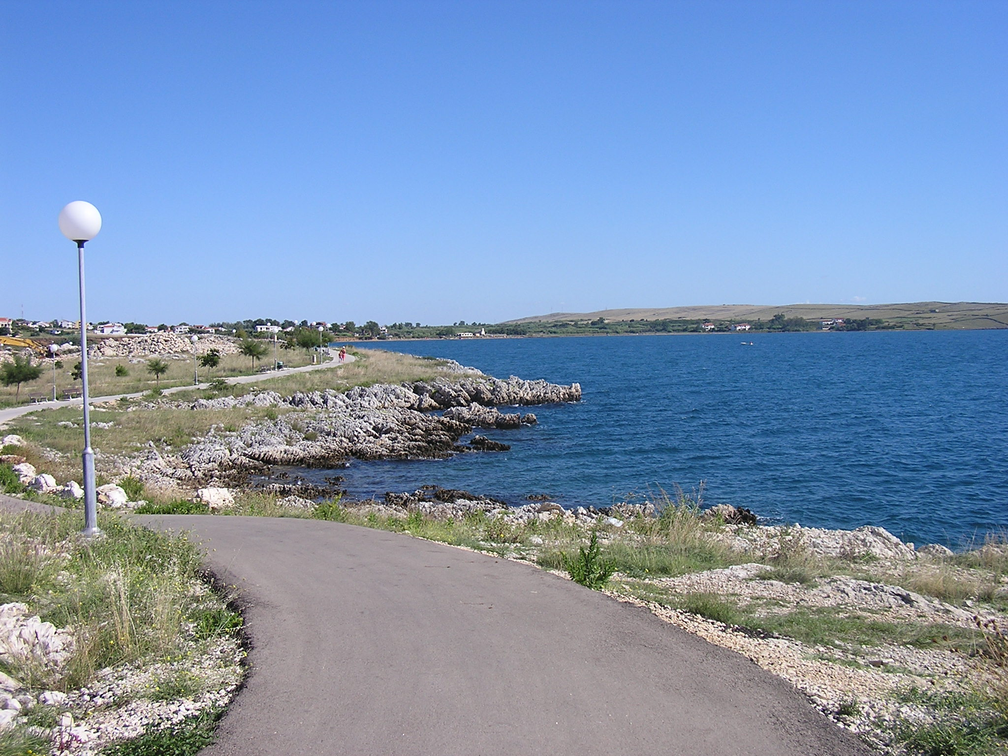 Island Pag